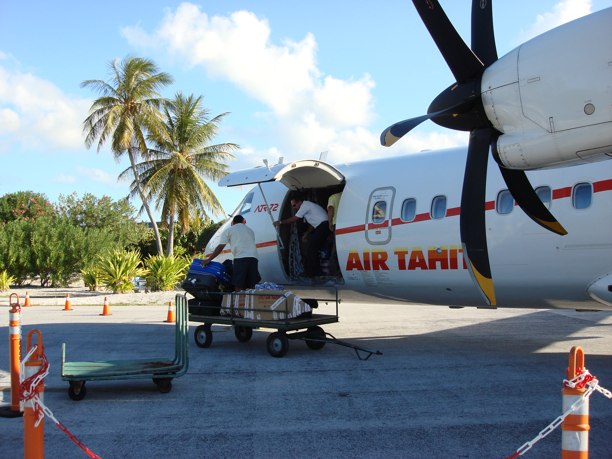 Air Tahiti ATR 72